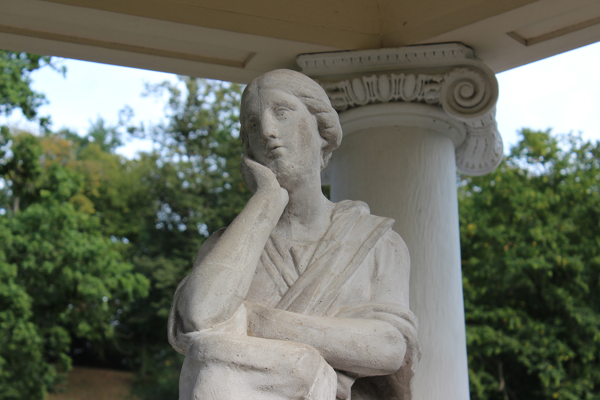 Musentempel im Schlosspark Tiefurt, Detailaufnahme von der Statue